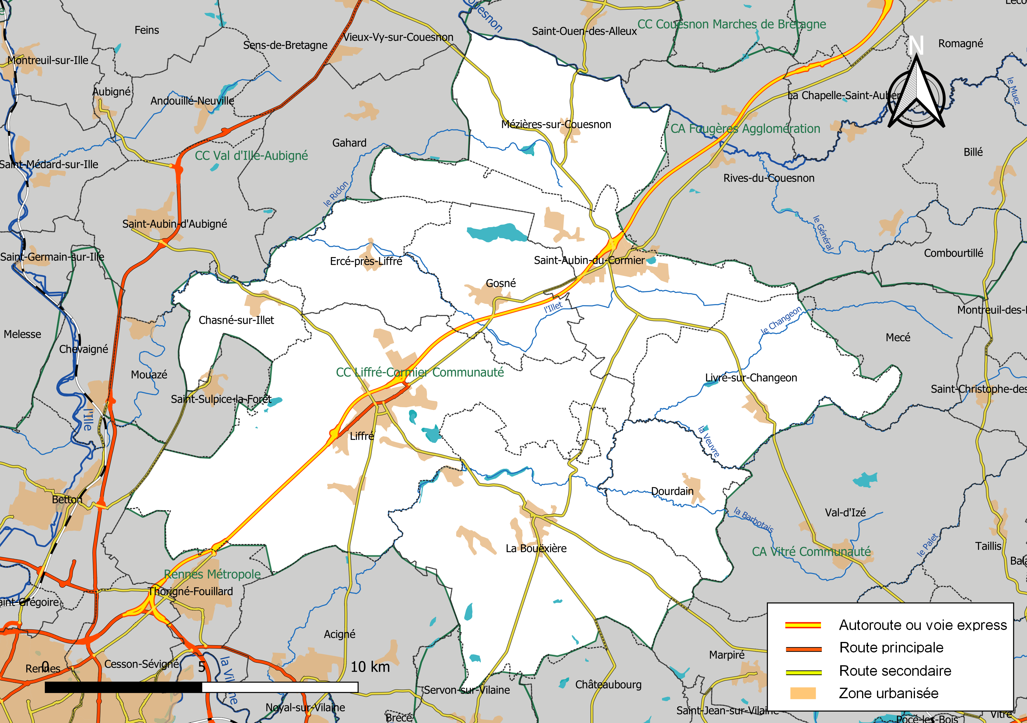 Carte géographique de l'intercommunalité Liffré-Cormier Communauté, département d'Ille-et-Vilaine, France. Composition au 1er janvier 2019.